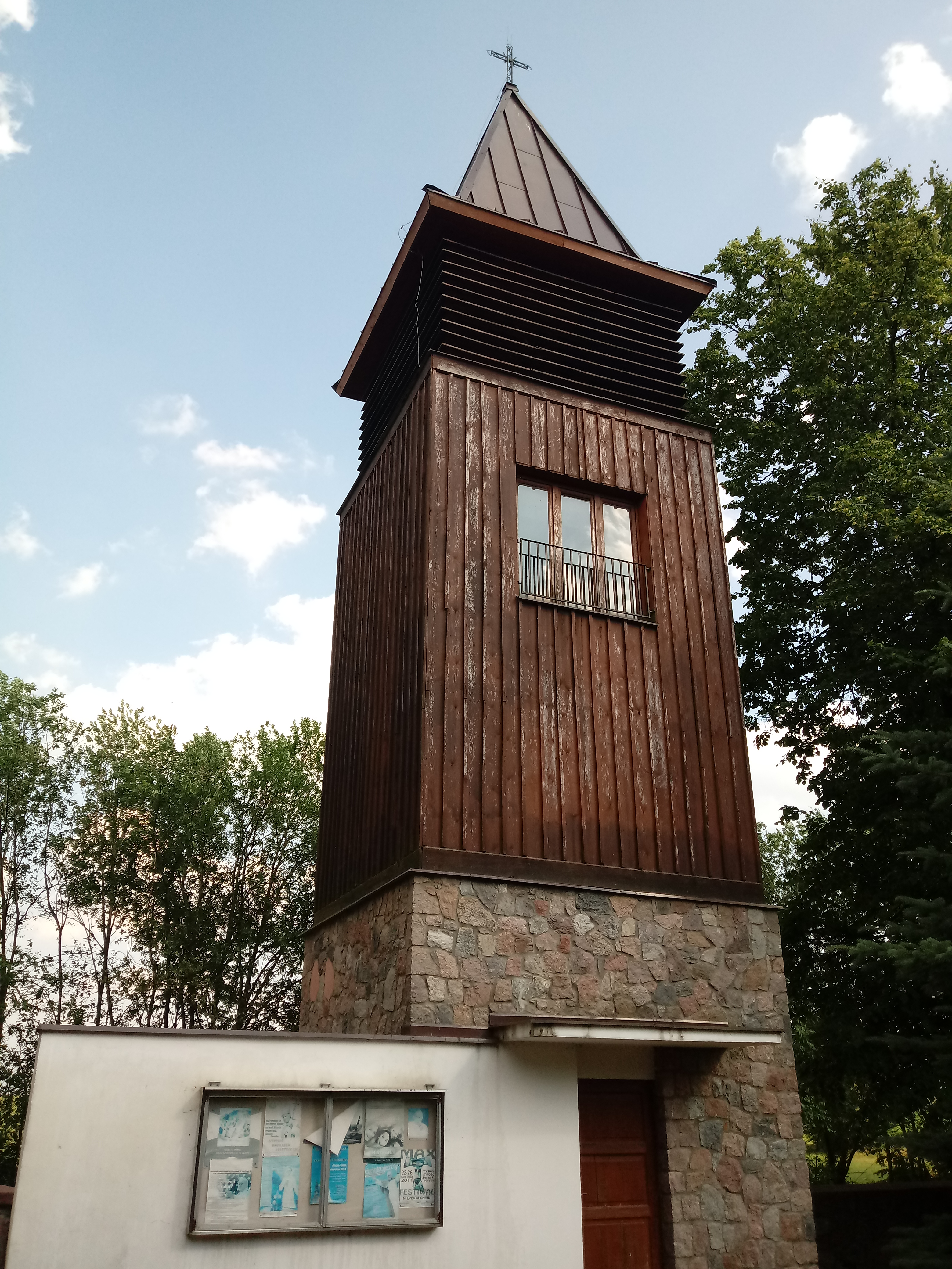 Dzwonnica murowana, wzniesiona w 2006 roku.